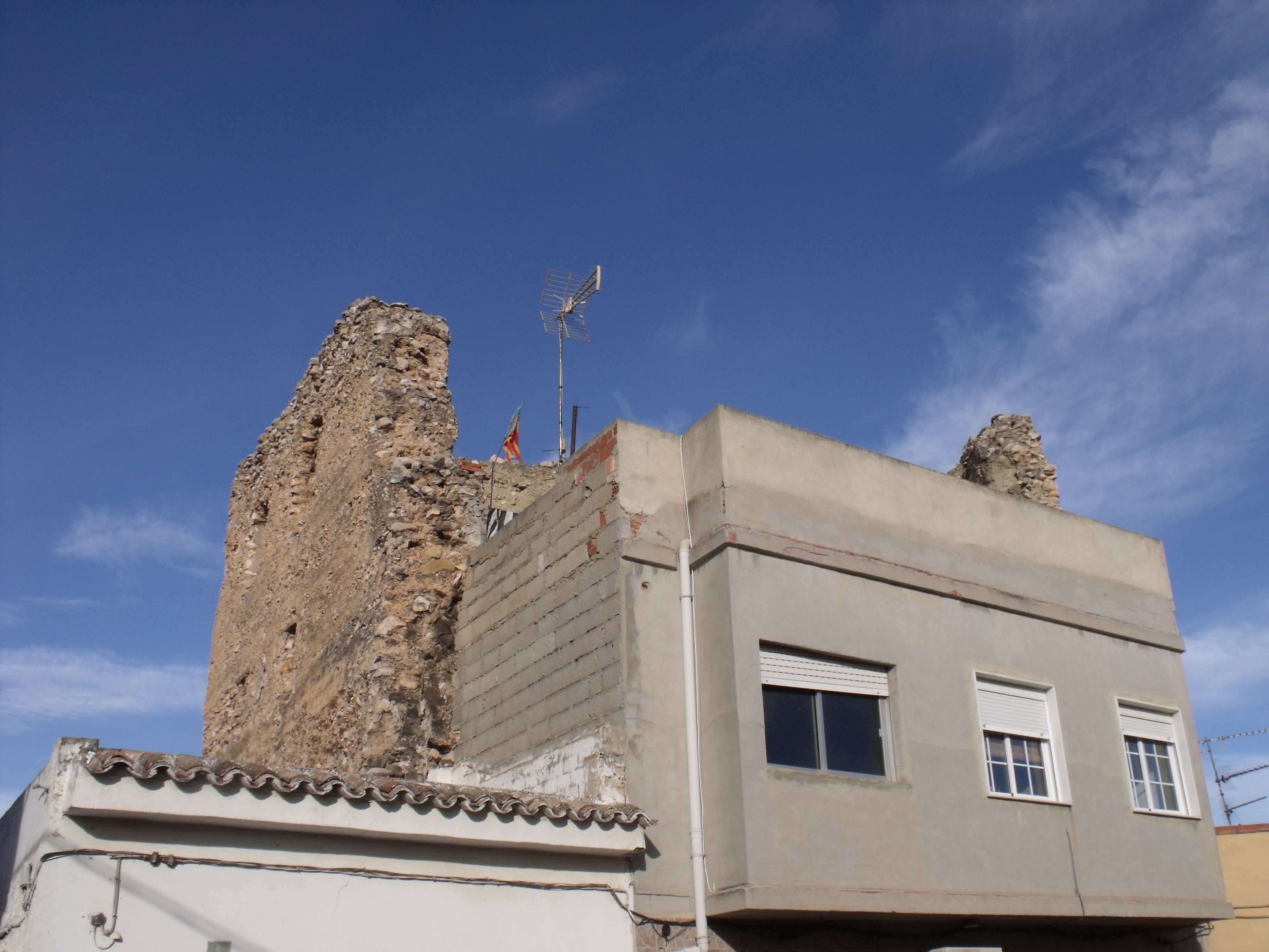 Villamarchante: castillo.